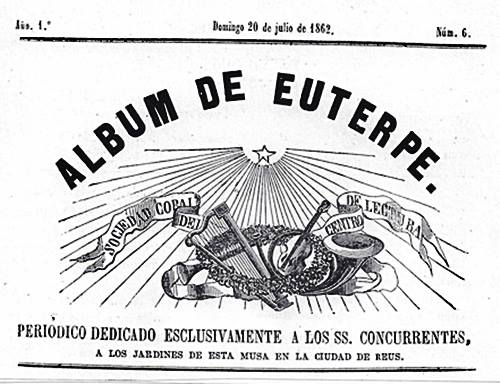 Capçalera del número 6 de l'Àlbum de Euterpe